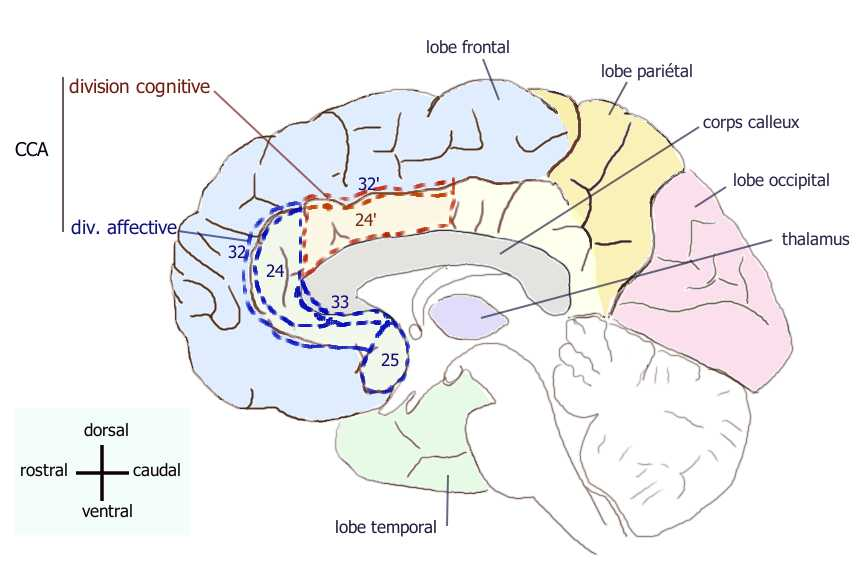 CCA : divisions cognitive et affective du cortex cingulaire antérieur